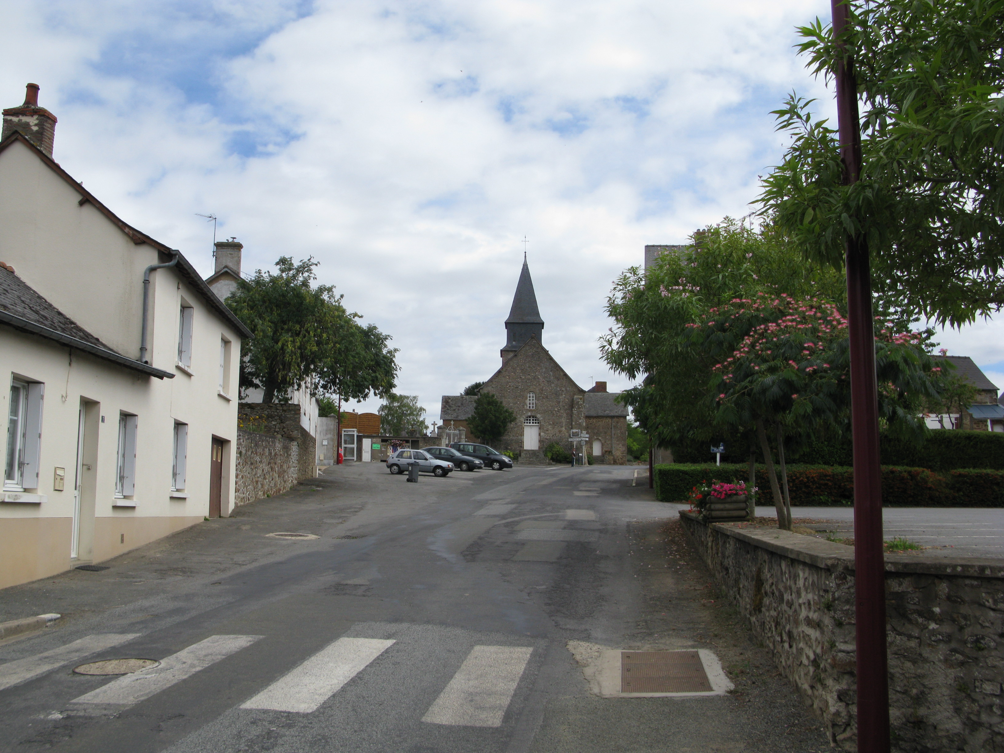 Vue générale